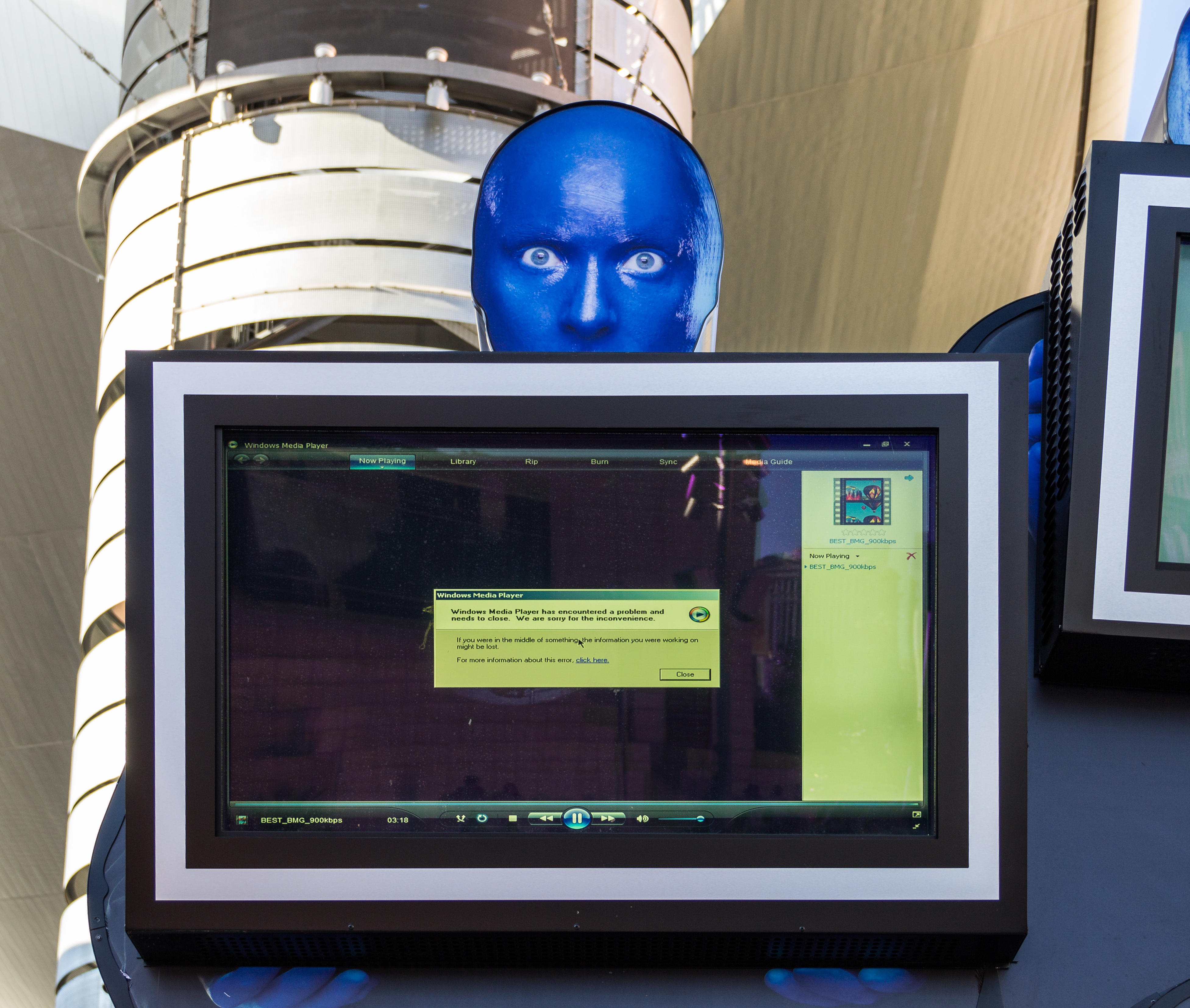 (Error message at) The Strip, Las Vegas (Nevada, USA)